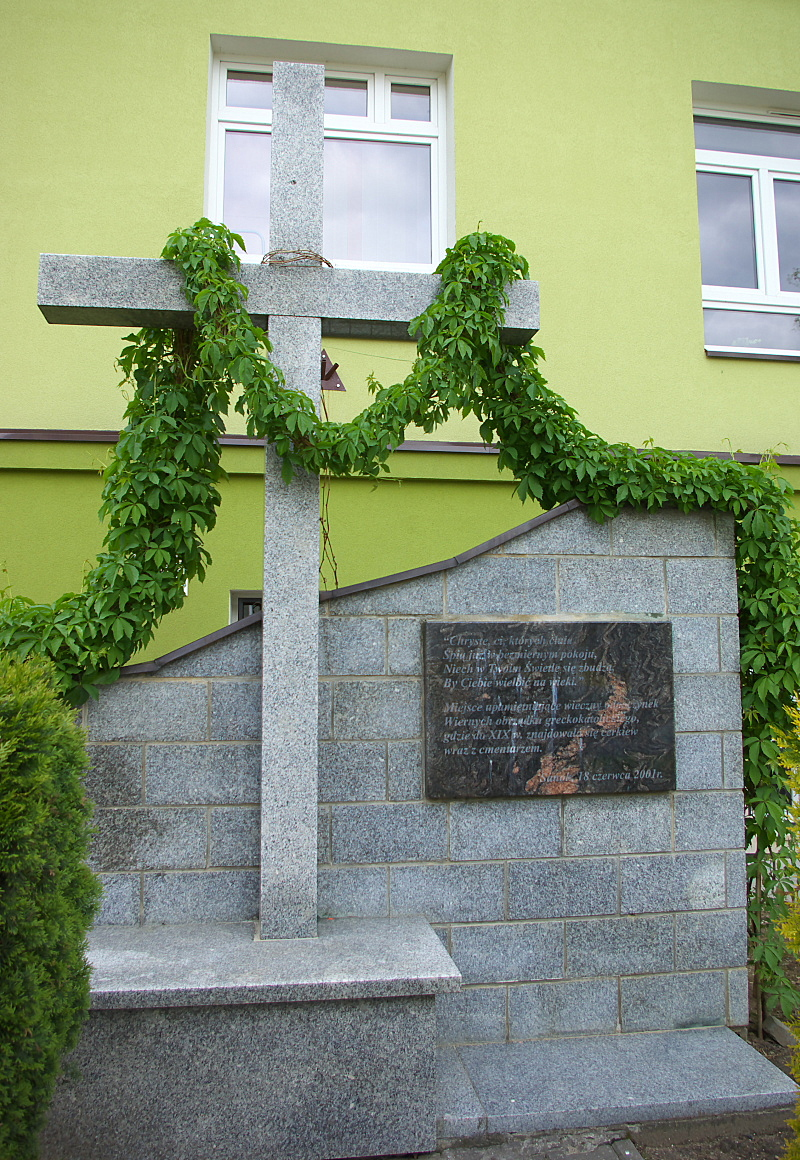 Pomnik przy Ekonomiku Sanok